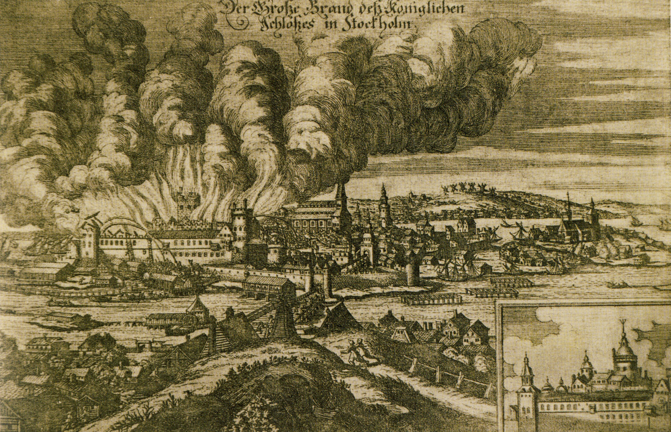 "Der Große Brand deß Koniglichen Schloßes in Stockholm"